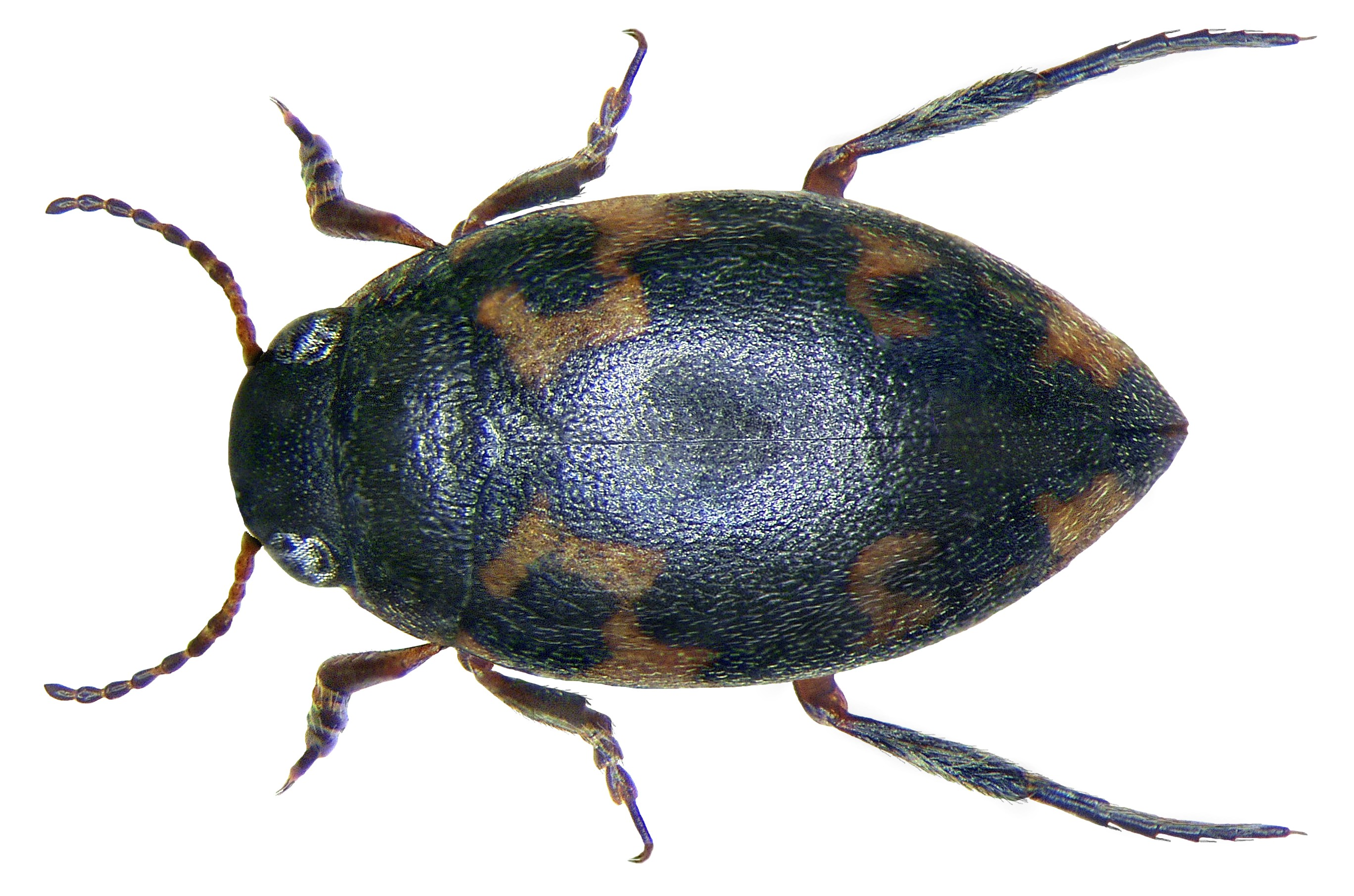 Stictonectes lepidus (Olivier, 1795) Familie: Dytiscidae Größe: 3-3,2 mm Verbreitung: mediterran, Frankreich, Belgien Fundort: Korsika, Forêt de l`Ospedale leg.det. U.Schmidt, 1973 Foto: U.Schmidt, 2008